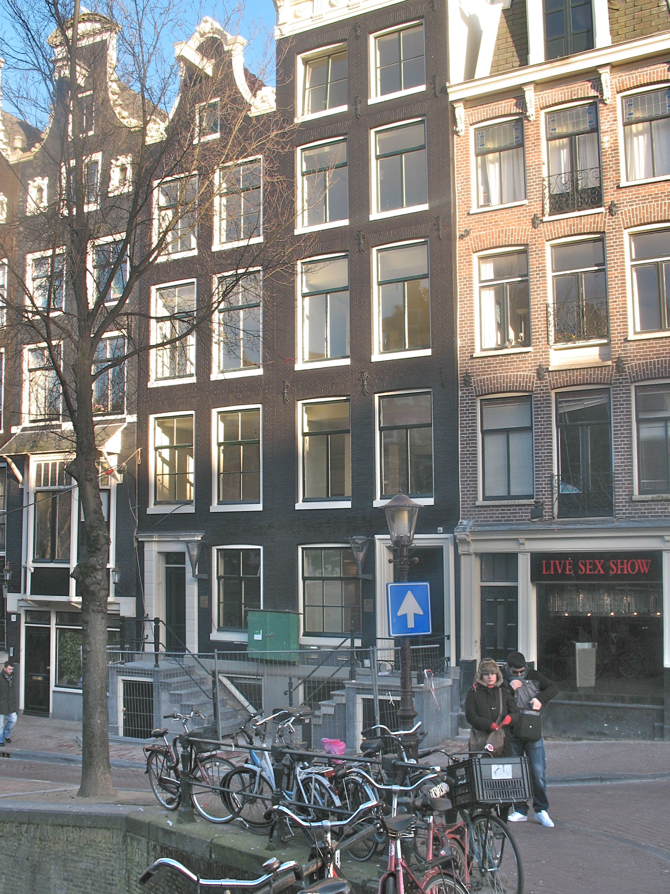 Rijksmonument Mata Hari, Oudezijds Voorburgwal 27-29 Amsterdam, na renovatie door woningcorporatie Ymere